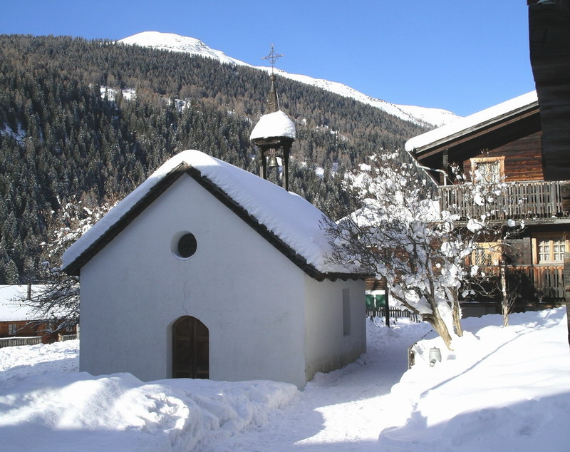 Kapelle in Steinhaus im Winter 2005